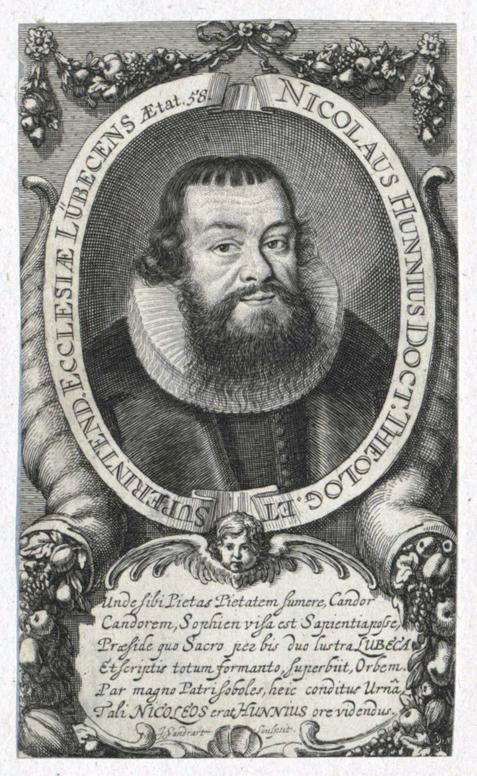 Kupferstich von Nikolaus Hunnius, (1585-1643), deutscher lutherischer Theologe